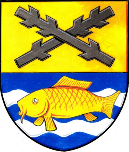 znak, Lhotka, okres Žďár nad Sázavou